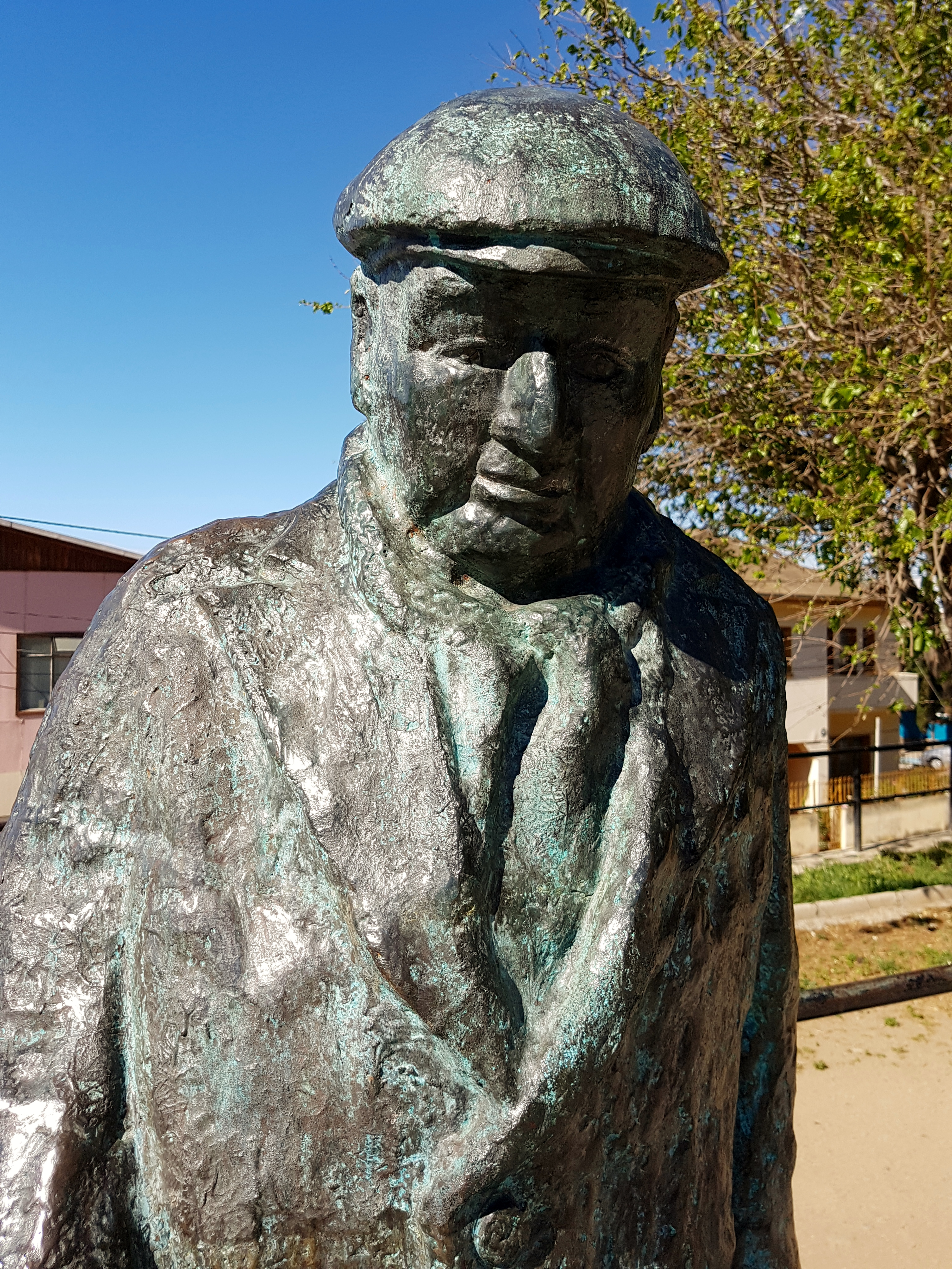 Escultura de Pablo Neruda, obra de Lucy Lafuente en la plaza Mena, más conocida como plaza de los Poetas, por estar también en ella las estatuas de Vicente Huidobro y Gabriela Mistral, cerro Florida, Valparaíso, Chile.